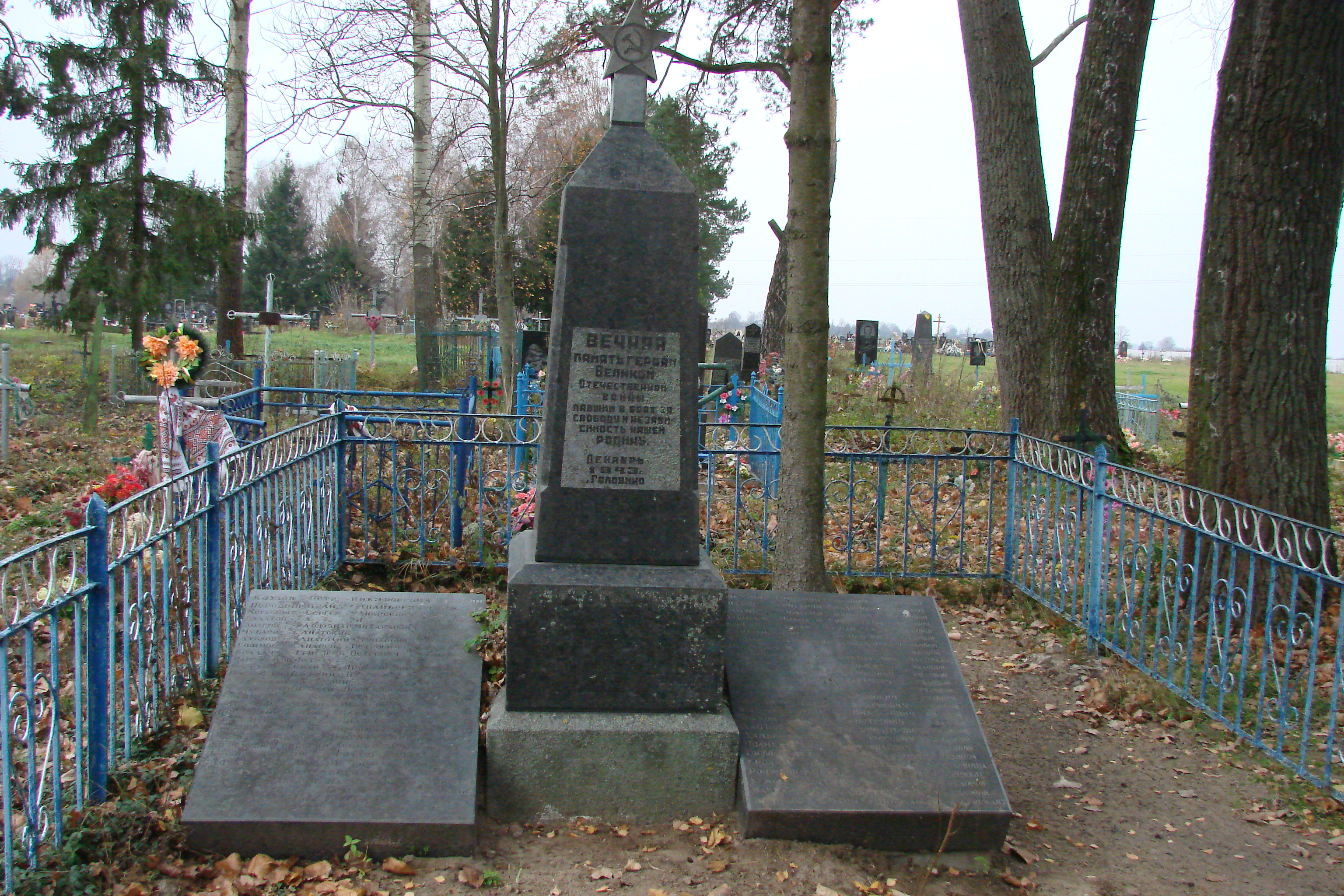 Братська могила радянських воїнів. Поховано 54 чол., Черняхівський район, смт.Головине, Головинська сел.Рада, на кладовищі.